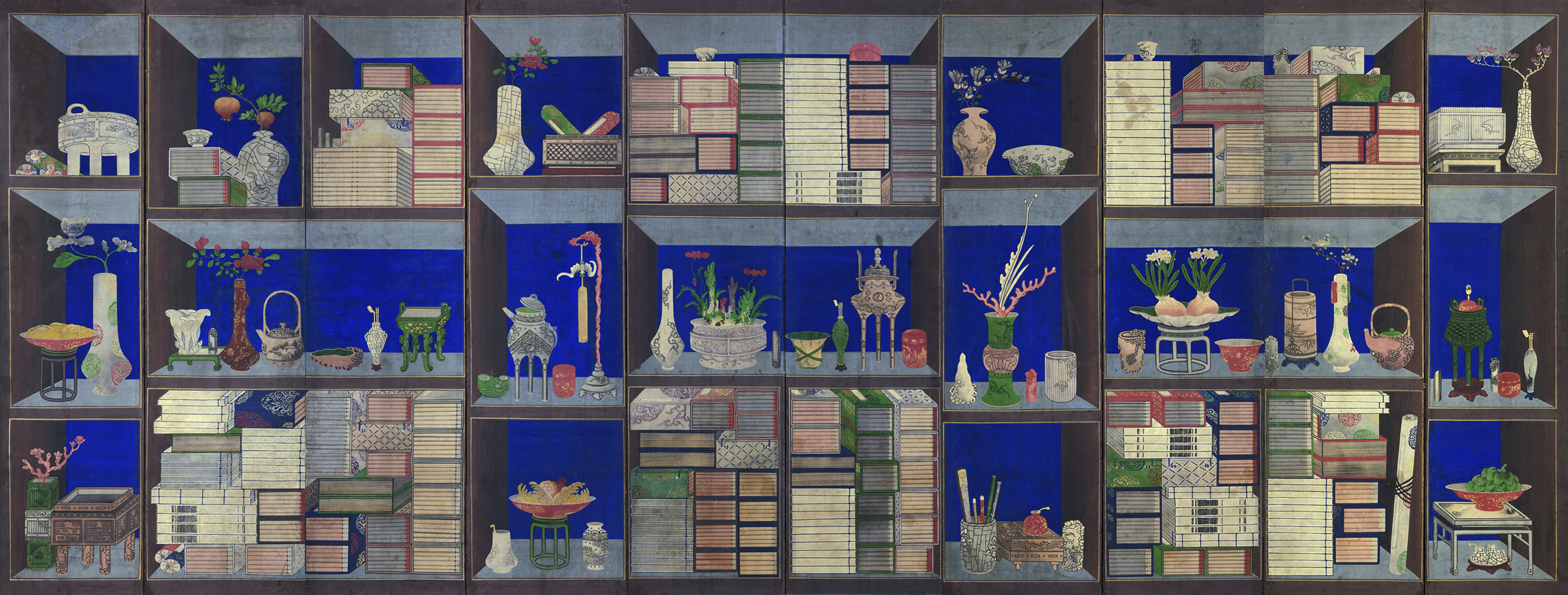 Chaekgeori